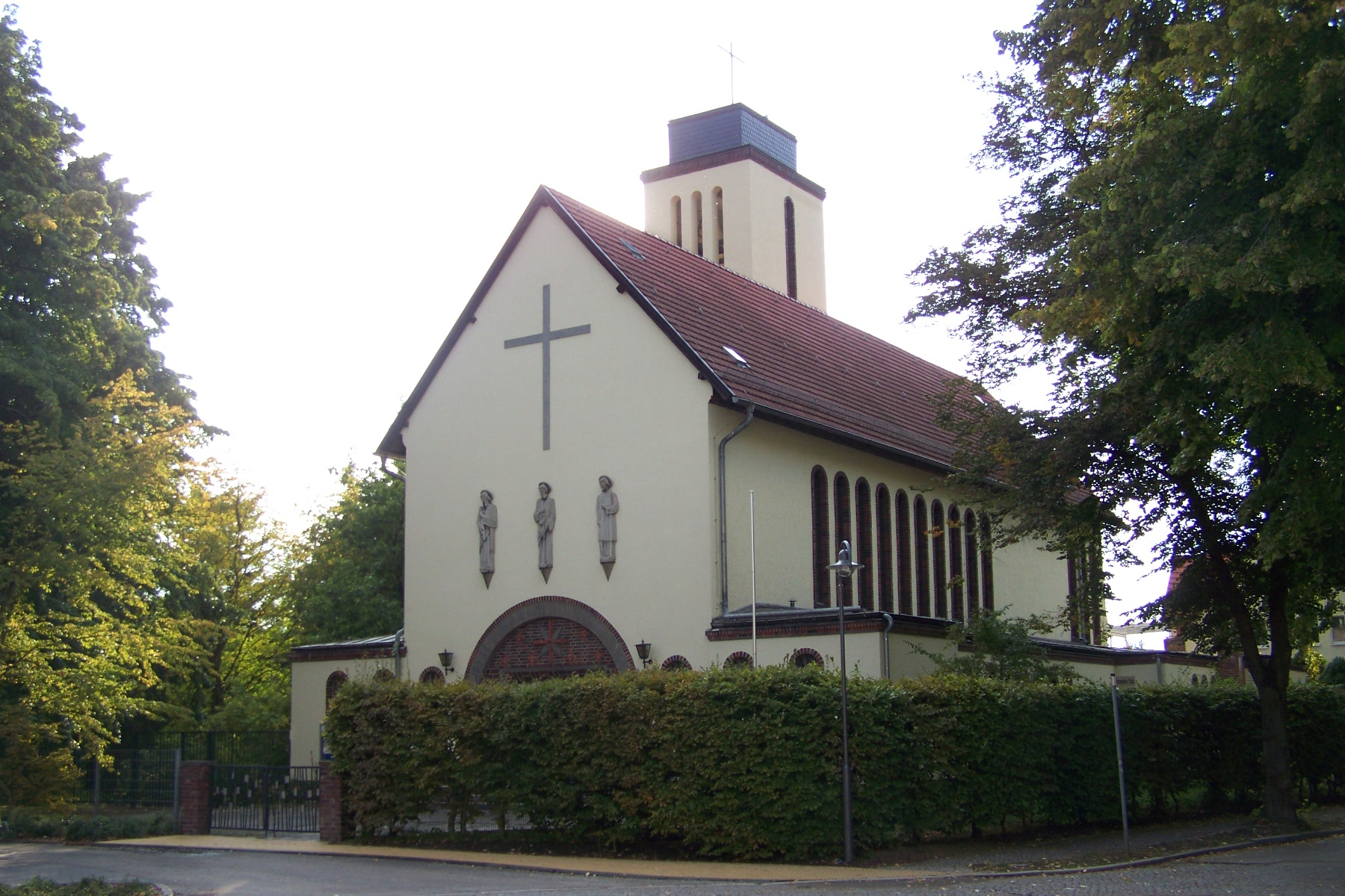 römisch-katholische Kirche St. Bonifatius in Erkner bei Berlin; erbaut 1932